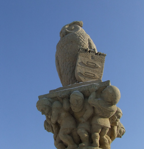 Pomnik sowy na kolumnie, symbolu miasta, położonego na Placu Wolności